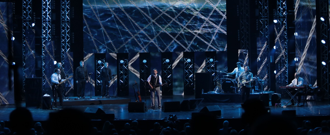 Концерт группы Любэ. Юбилей Николая Расторгуева: 60 лет.